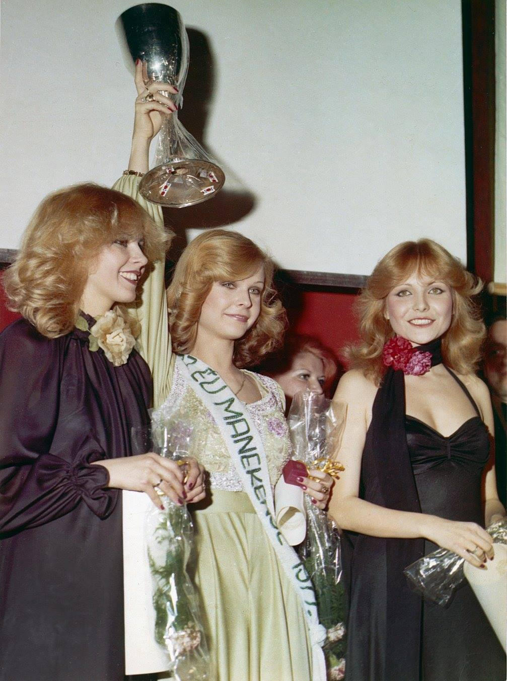 Az "év manekenje 1977" eredményhirdetése. Balról: Vadász Éva (III. helyezett), Komjáthy Ágnes (I. helyezett), Lajkovits Ágnes (II.helyezett)